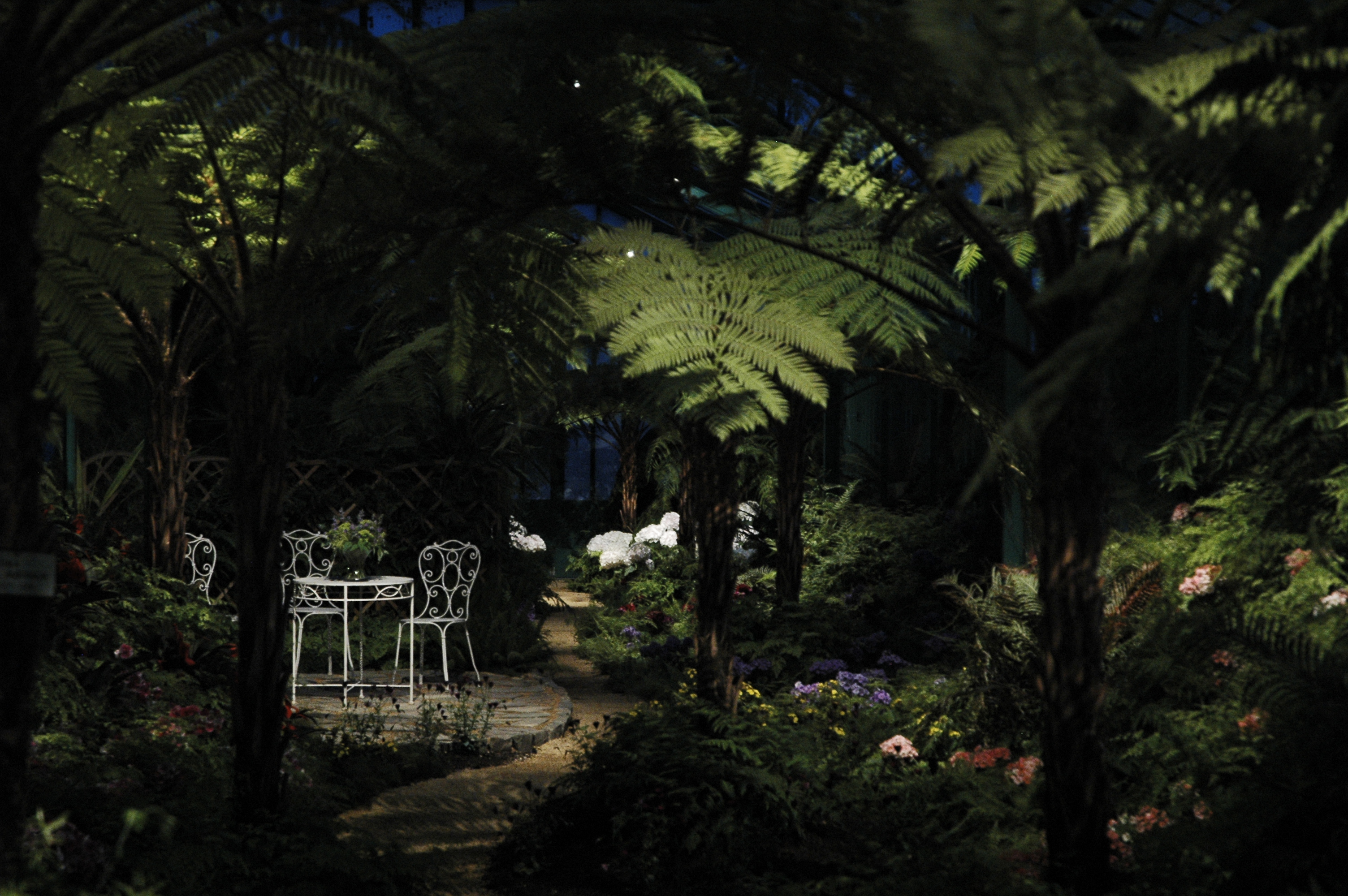 Serres de Laeken